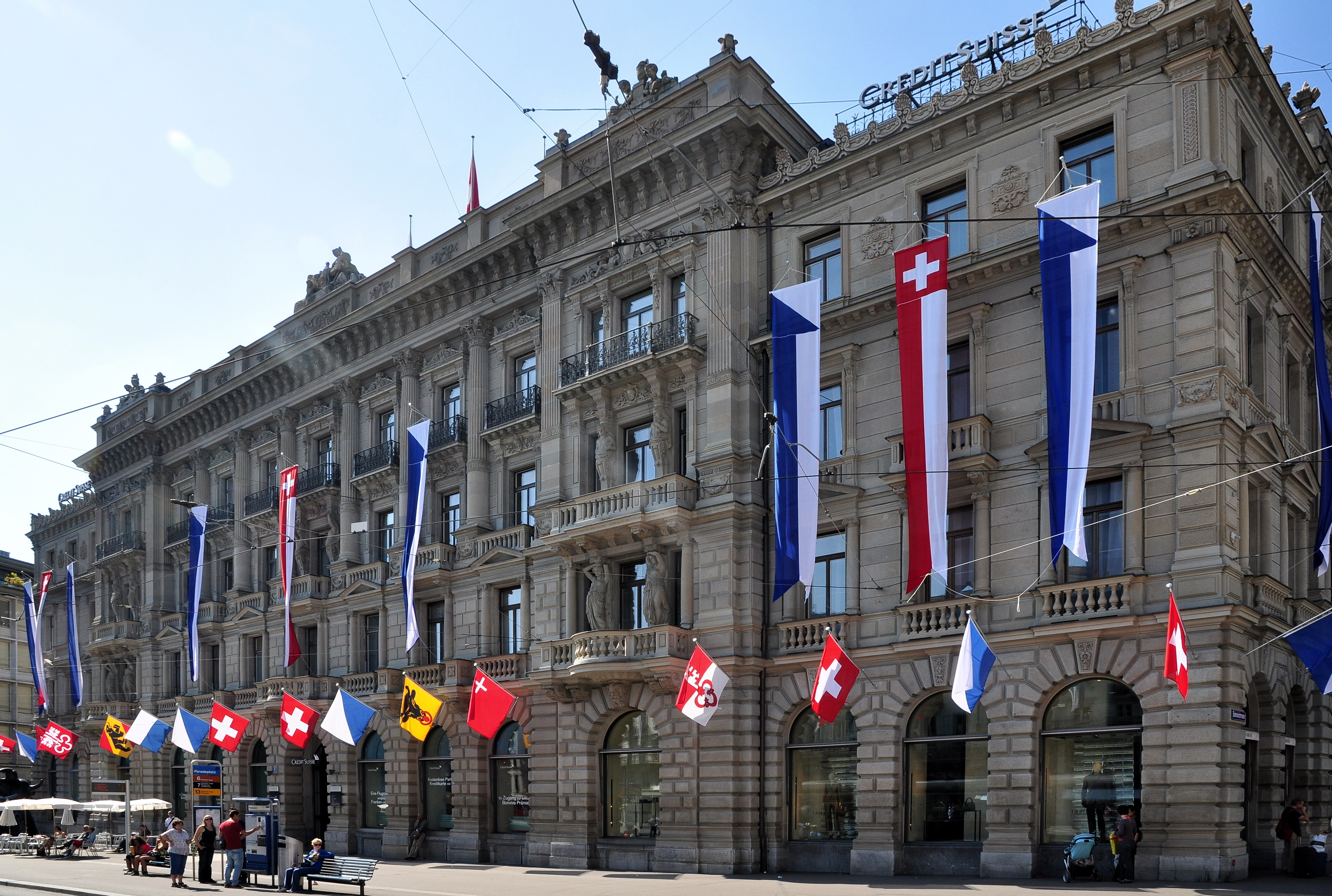 Credit Suisse, Paradeplatz in Zürich (Switzerland)